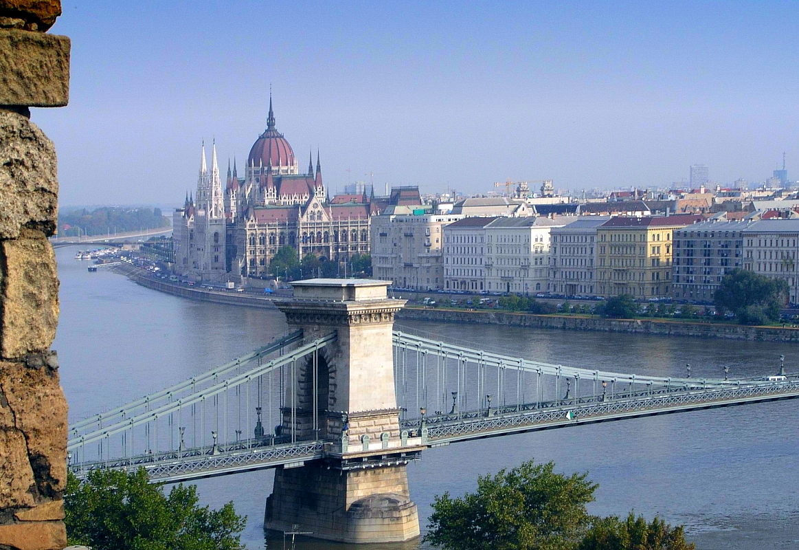 Budapest, Parliament